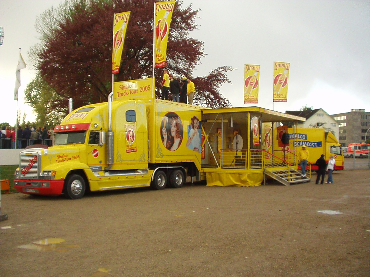 Showtruck "SINALCO"